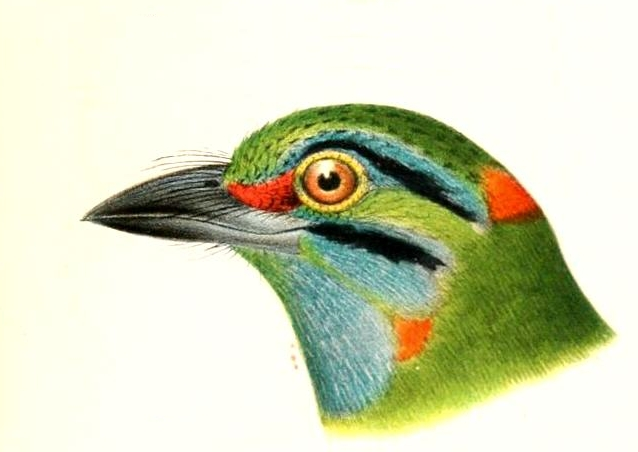 Cyanops incognita = Megalaima incognita Moustached Barbet